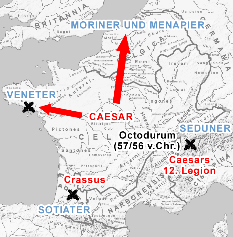 De bello gallico. 3. Buch.